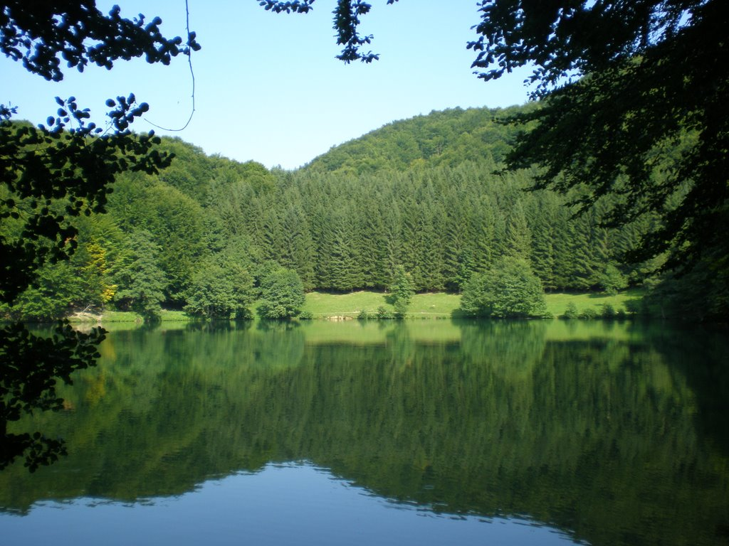 Jezero Balkana. Opština Mrkonjić Grad.